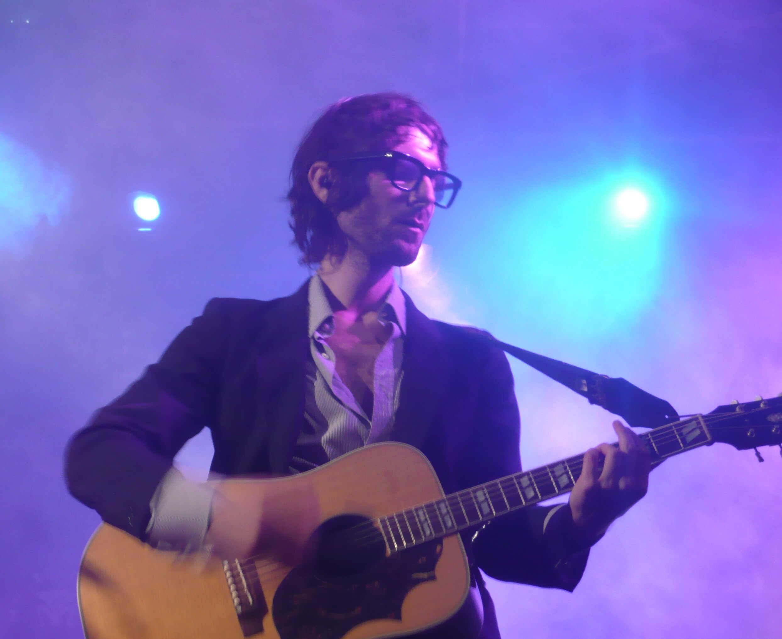 Francesco Bianconi dei Baustelle in concerto a Villa Ada, a Roma.